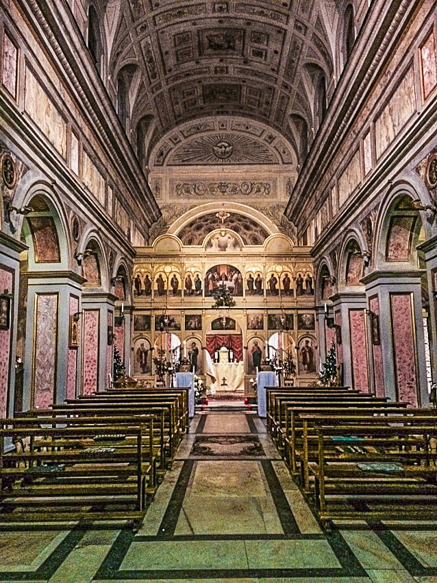 Interno